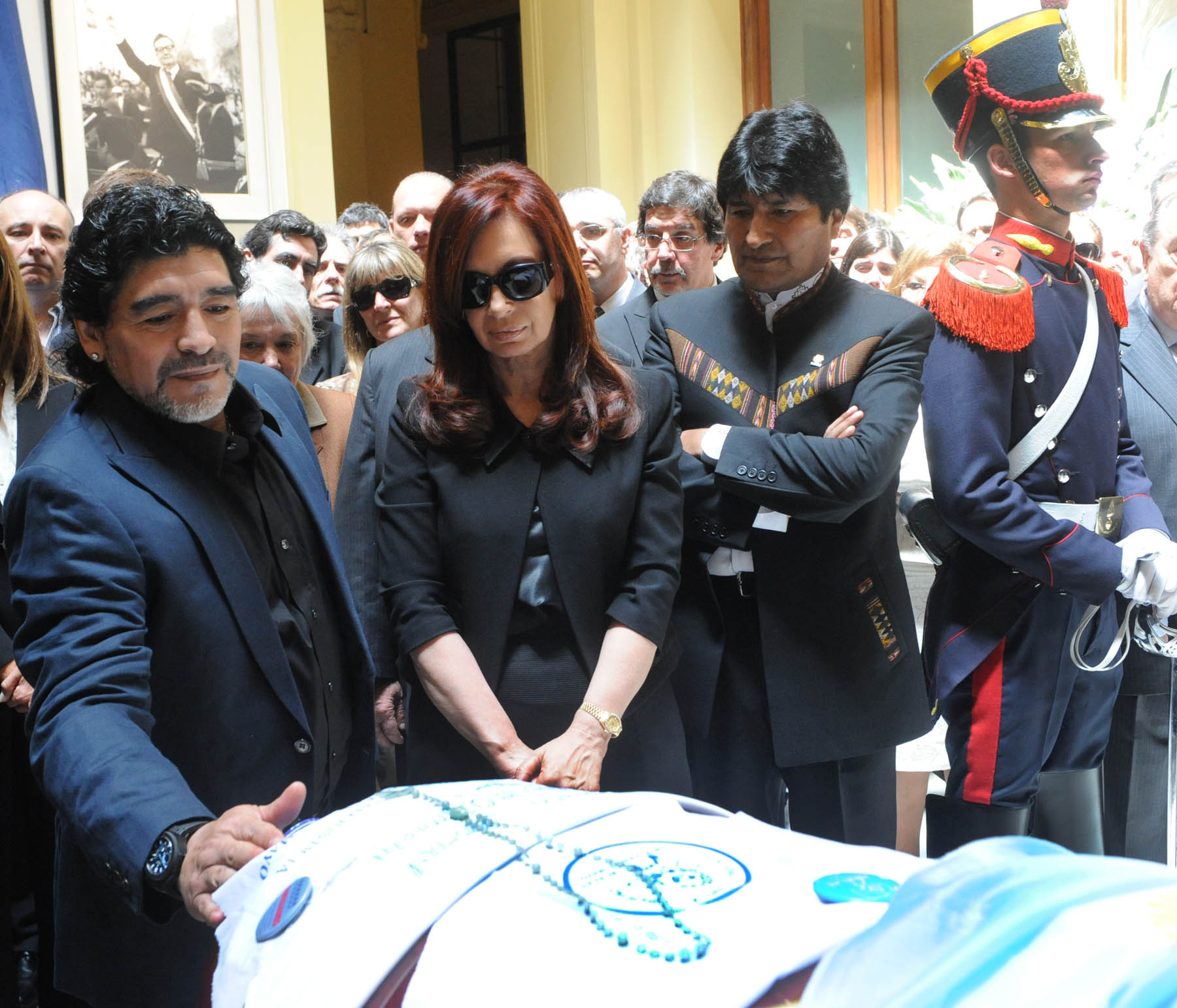 El ex DT de la selección nacional de fútbol y campeón mundial de 1986, Diego Maradona, en Casa Rosasa, da su último adiós a Néstor Kirchner.